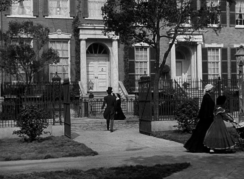 Washington Square, New York, en 1949. Image extraite du film de William Wyler "L'héritière".